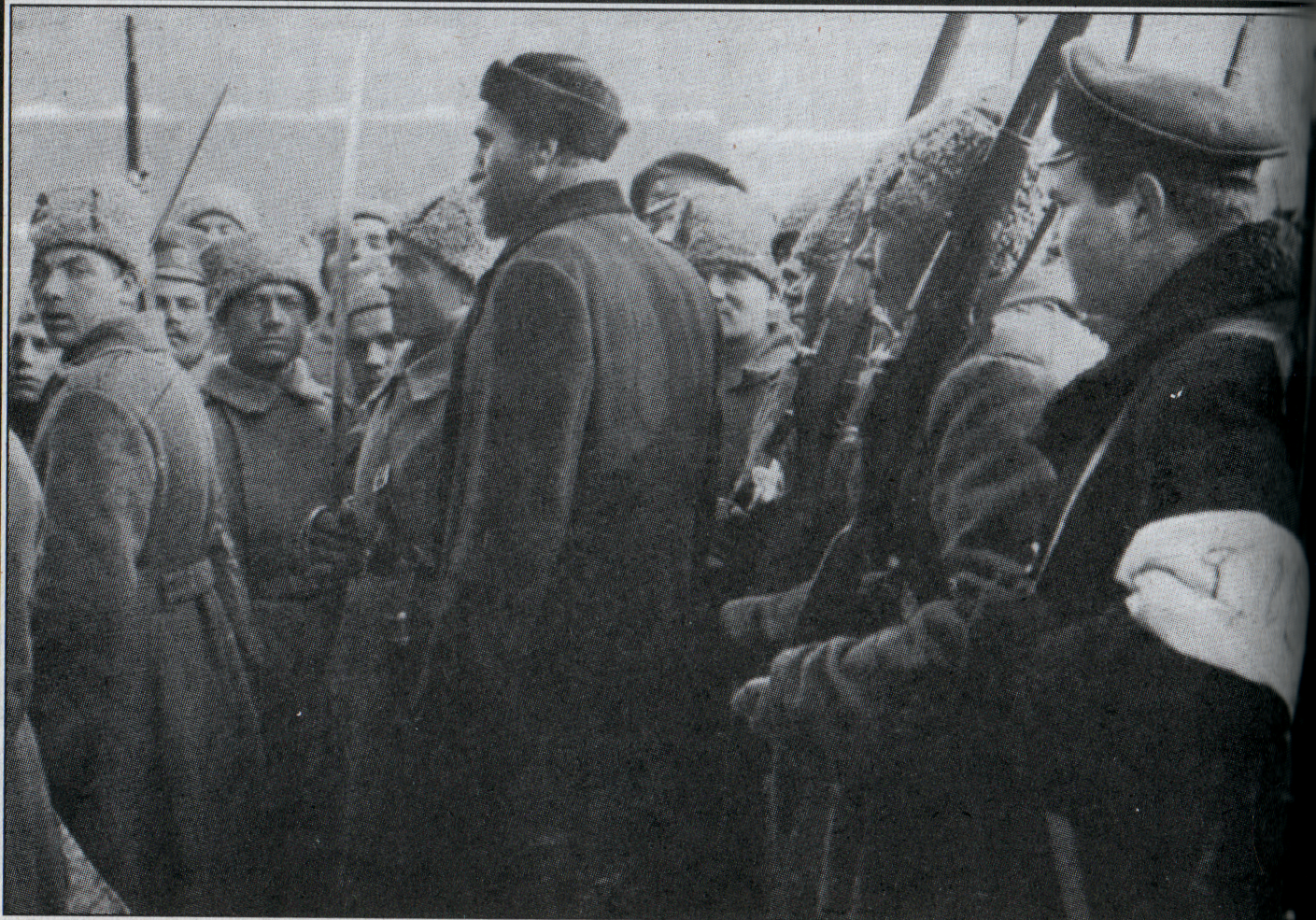 Detención de un policía por soldados insurrectos durante la Revolución de Febrero en Rusia.